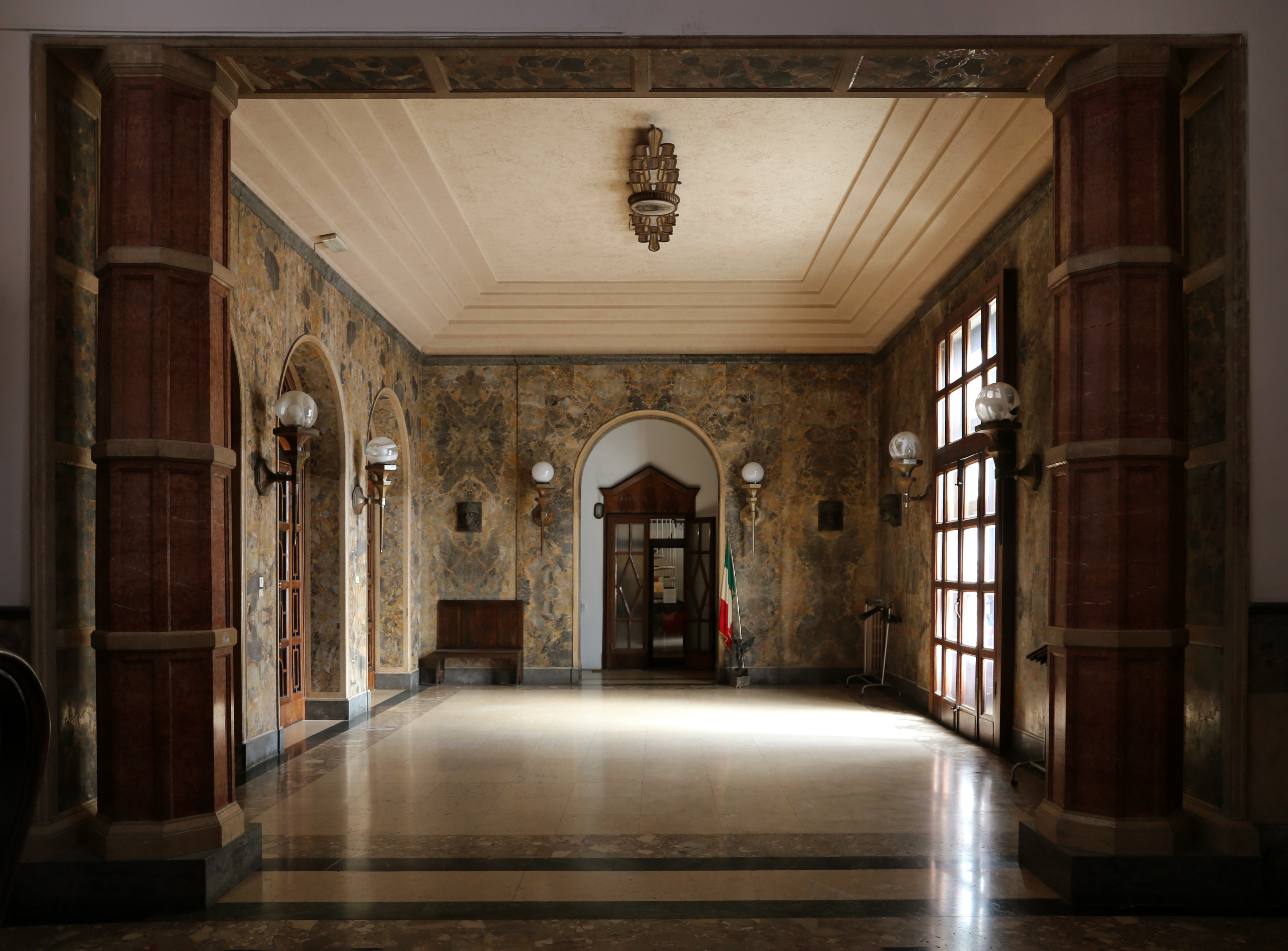 Casa del Mutilato This is a photo of a monument which is part of cultural heritage of Italy.